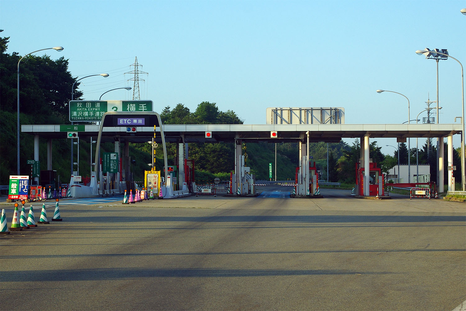 秋田自動車道 横手インターチェンジ